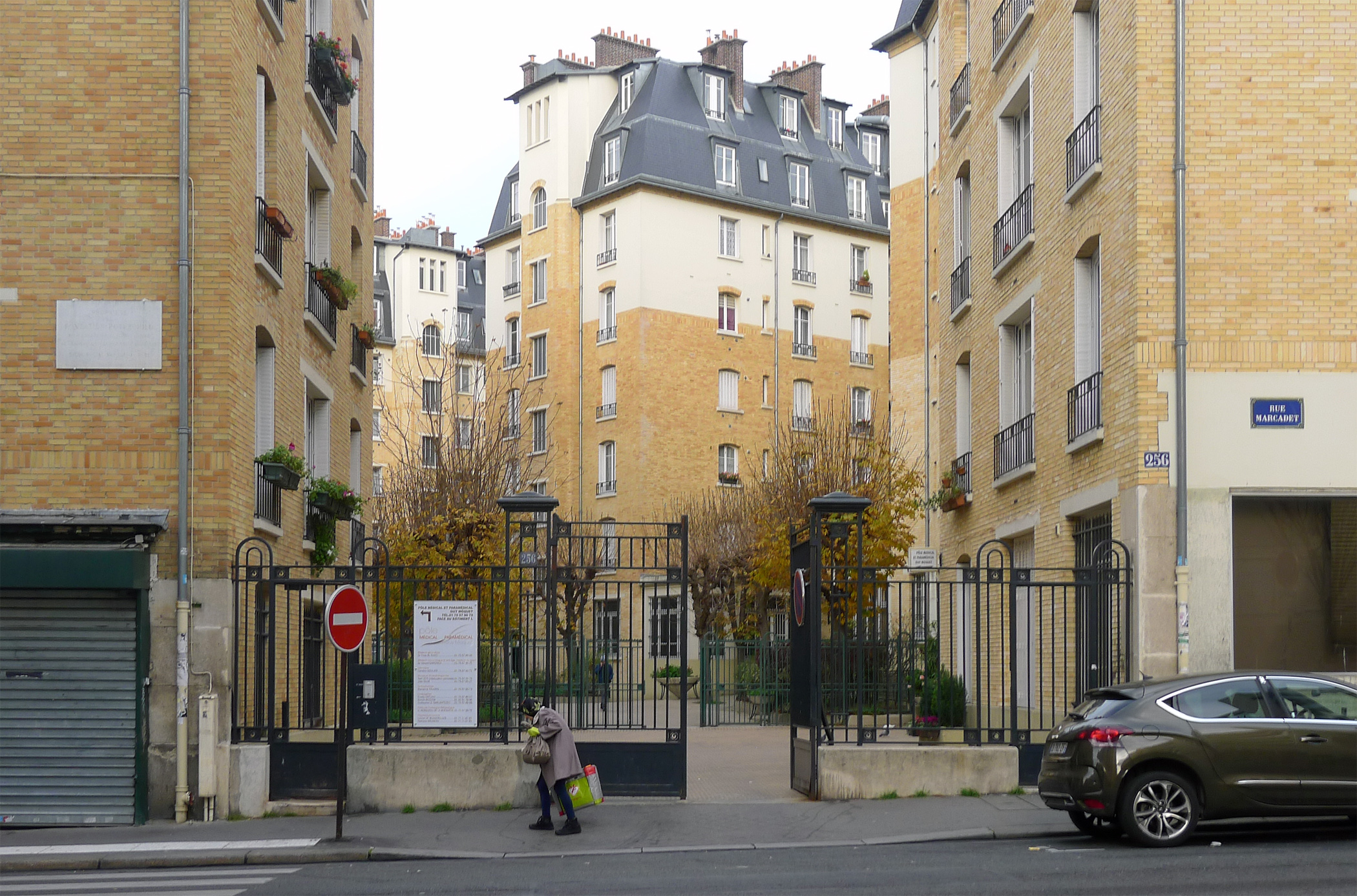 Rue Marcadet (n°256) - Paris XVIII